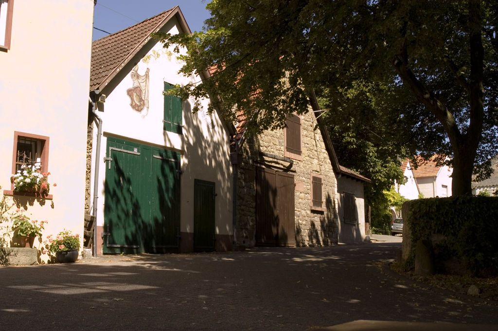 Kellerweg in Guntersblum vom Julianenbrunnen aus gesehen.